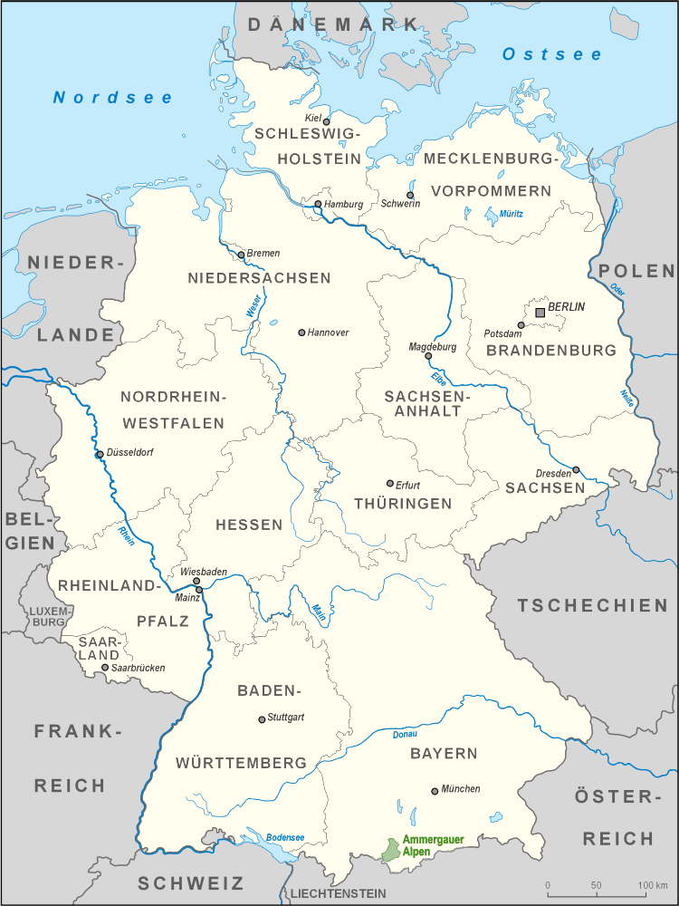 Karte des Naturparks Ammergauer Alpen in Deutschland